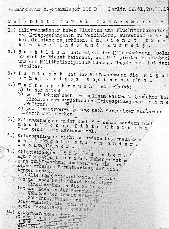 Merkblatt für Hilfswachmänner vom 20.11.1943, aufgestellt vor der Amerika Gedenkbibliothek in Berlin-Kreuzberg